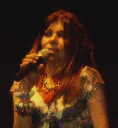 Jeanette cantando en Arequipa - Perú en junio del 2011.